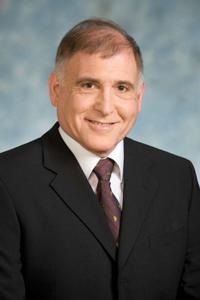 איציק אביב